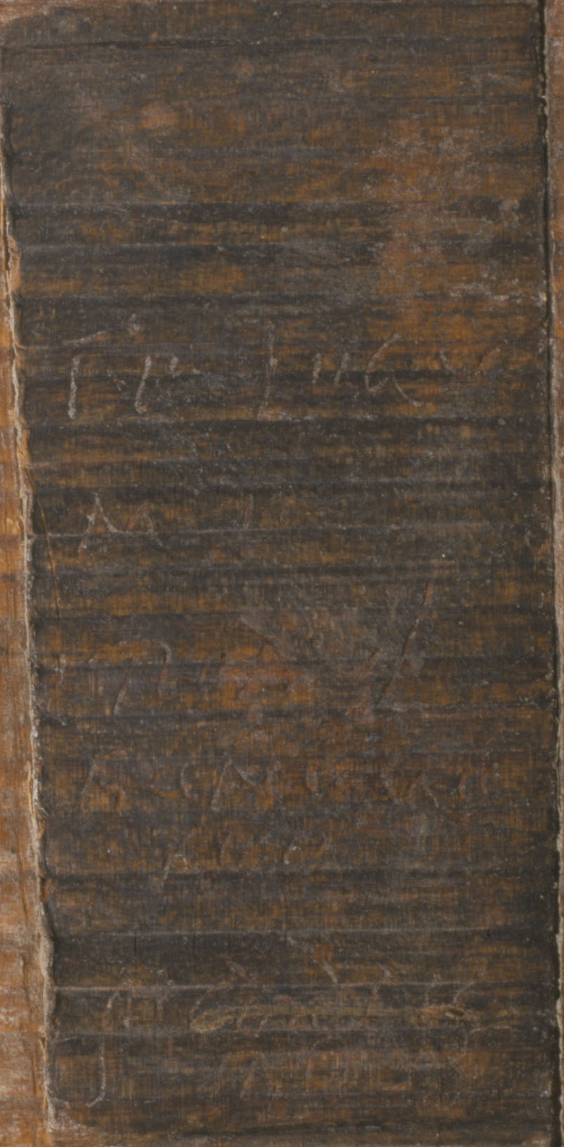 Uitsnede van de rechterzijde van de achterkant van het "Schrijfplankje van Tolsum" met deels zichtbaar de Latijnse tekst op dit wastafeltje.